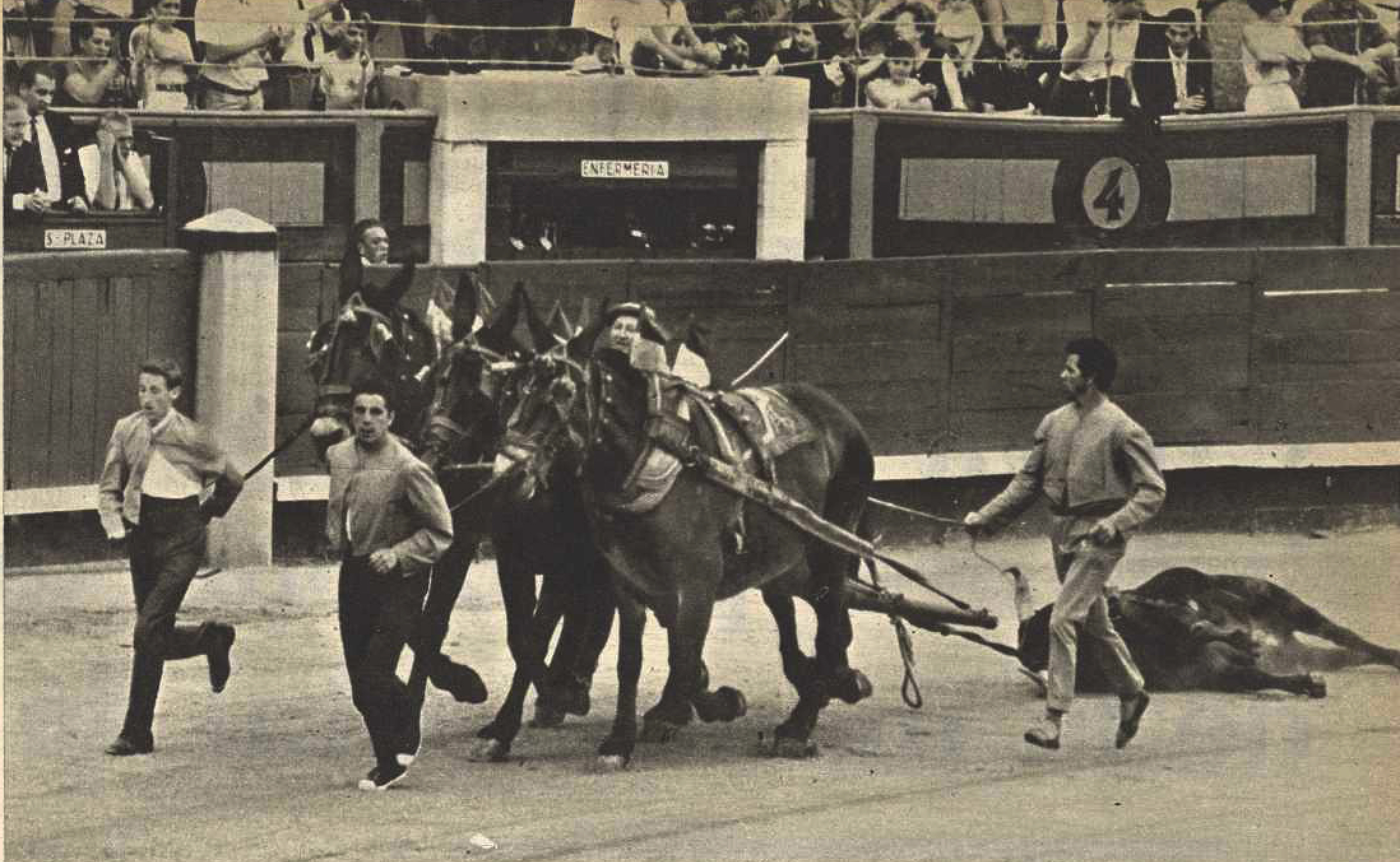 Toro "Arábica", de la ganadería del Conde de la Corte, lidiado el 20 de mayo de 1965, premiado con la vuelta al ruedo en el arrastre en la Plaza de toros de Madrid